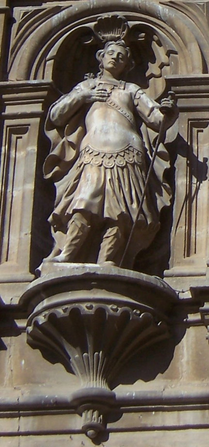 San Emeterio - Pórtico de la Catedral de Santo Domingo de la Calzada